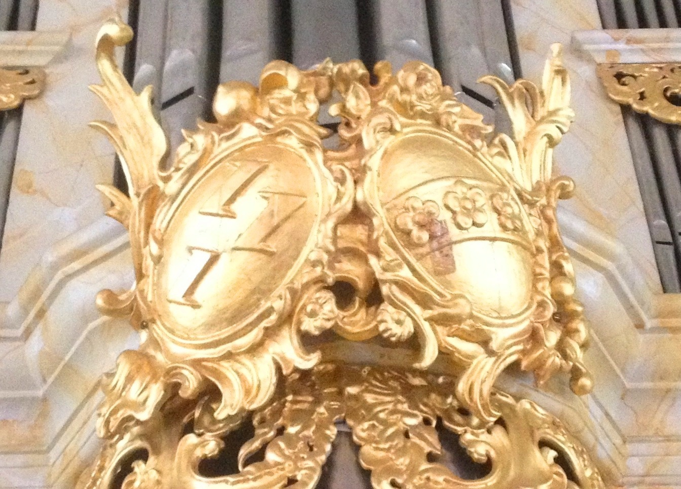 Liebenburg, Schlosskirche Mariä Verkündigung, Wappen Brabeck und Kerckerinck an der Orgel